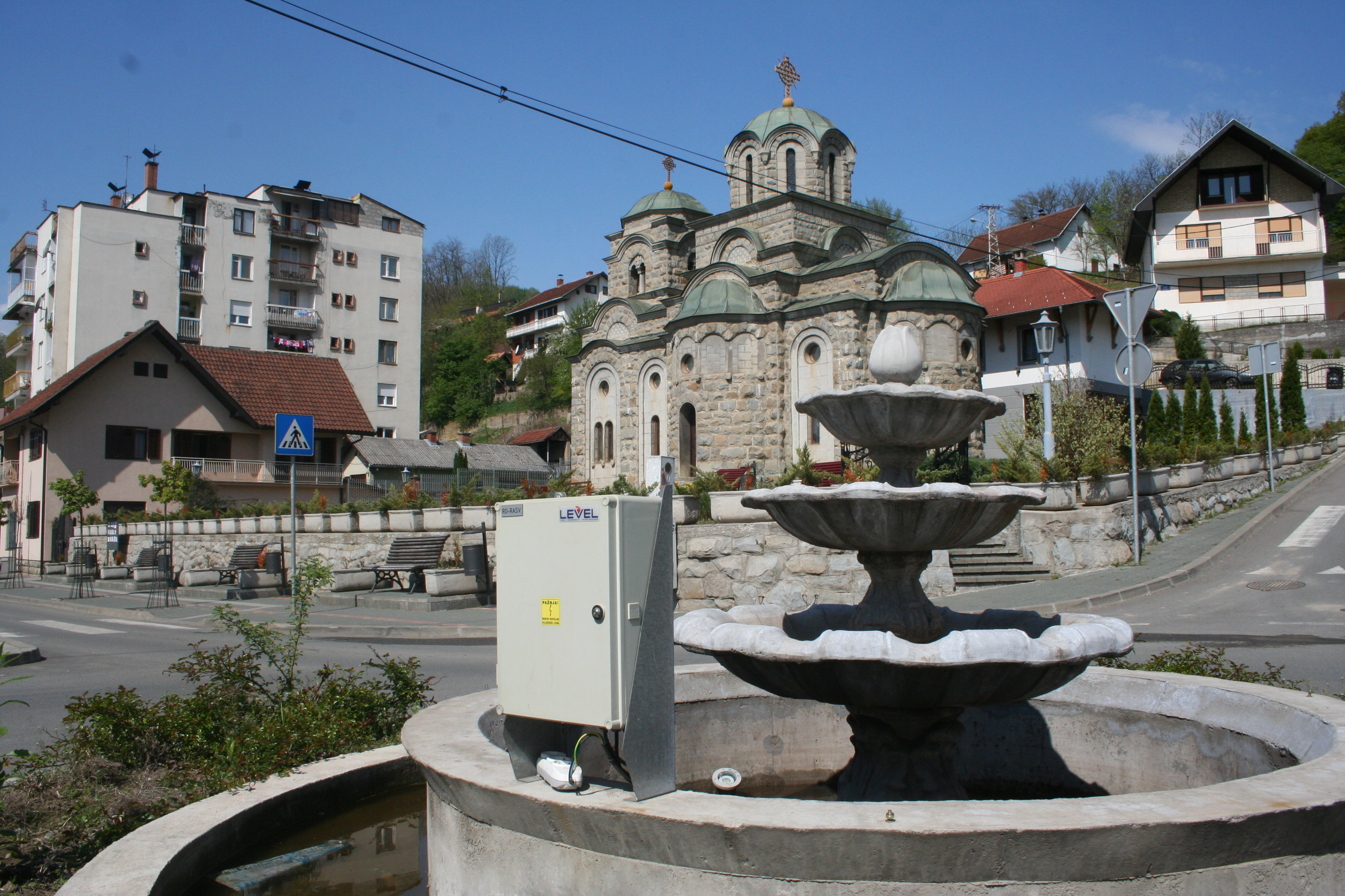 Ljubovija